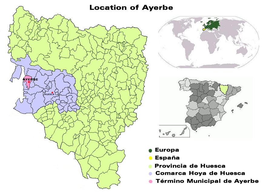 Mapa del Término municipal de Ayerbe Creado de 10.10.06 por Dionisio en base a Image:Aragon municipalities.png, Image:Provincia Huesca.png , Image:LocationEurope.png